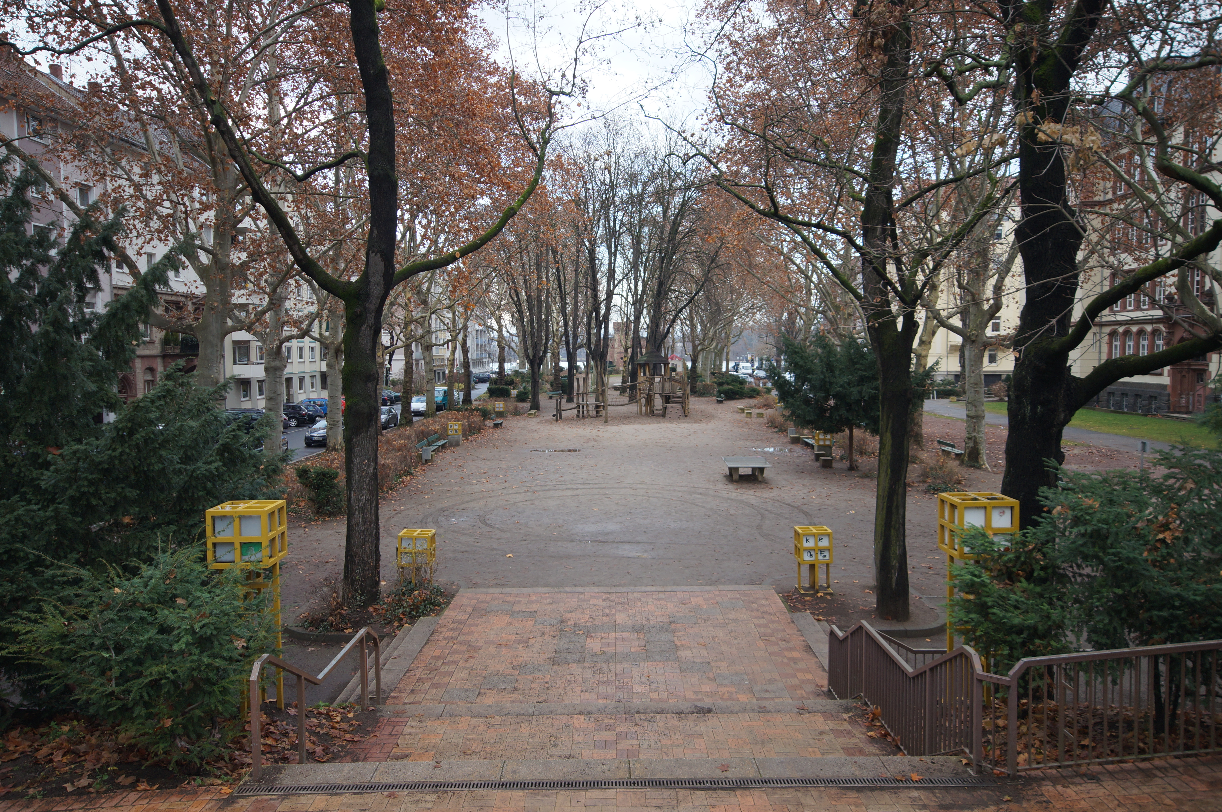 Der Feldbergplatz in Mainz-Neustadt